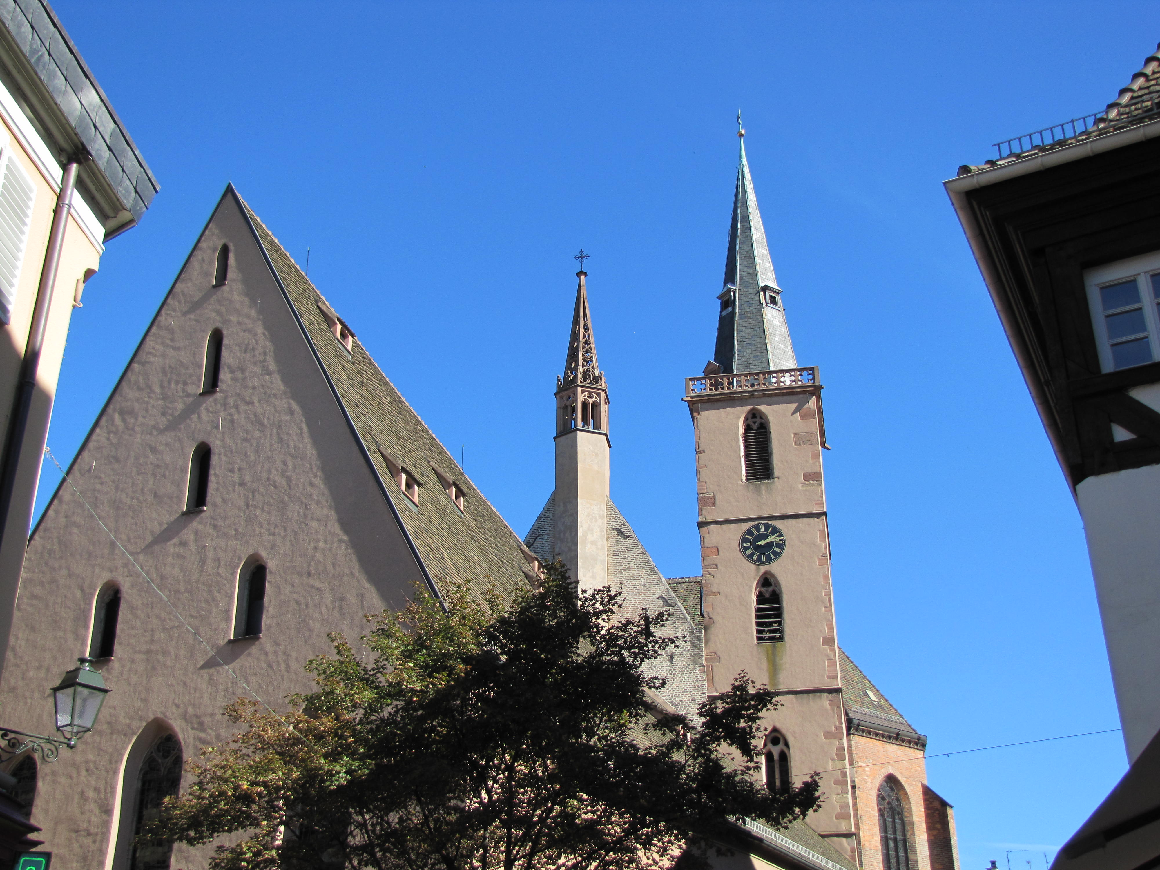 Alsace, Bas-Rhin, Église Saint-Pierre-le-Vieux de Strasbourg (PA00085031).